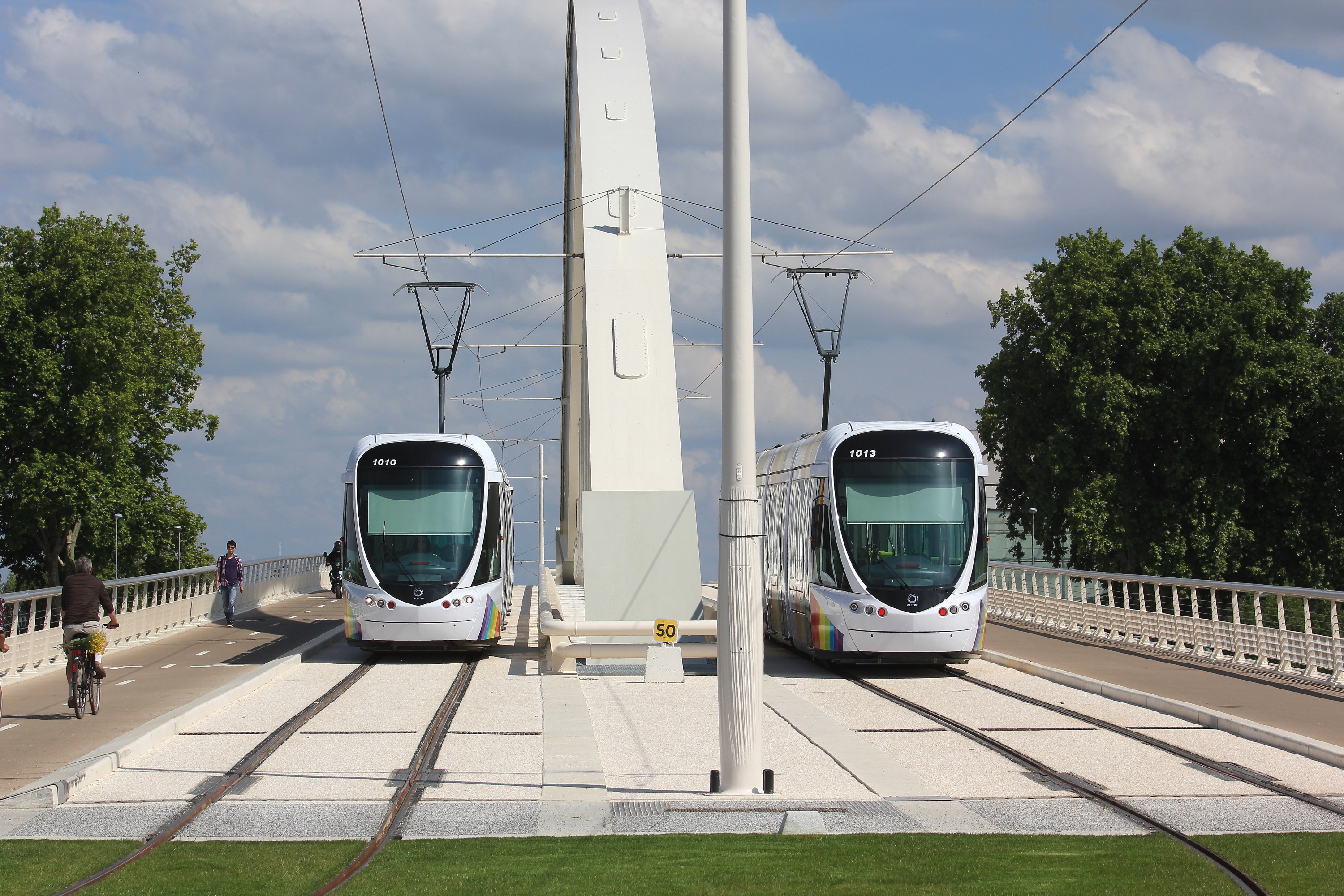 Rames Citadis n°1010 et n°1013 du tramway angevin sur le Pont Confluences traversant La Maine, côté rive droite.